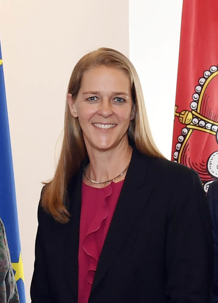 Wien am 16. Mai 2019, LandesintegrationsreferentInnenkonferenz (LIRK) Foto: Mahmoud